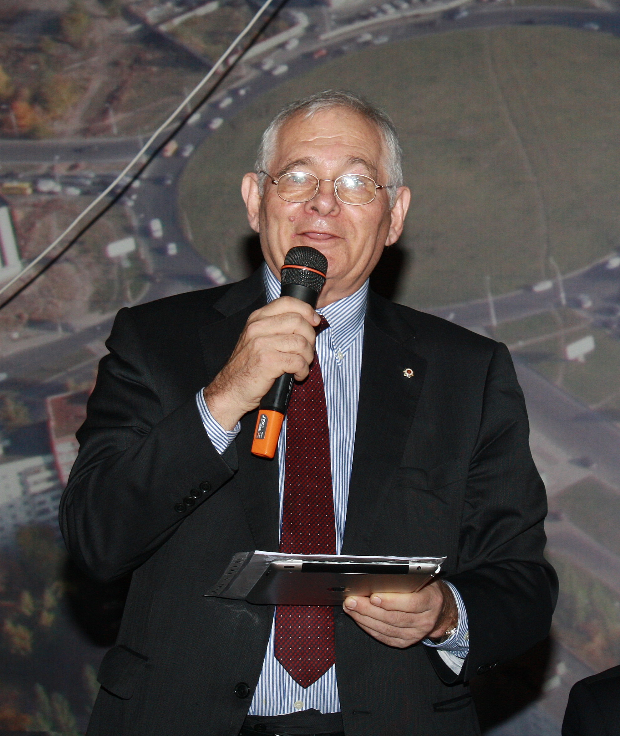 Леони́д Миха́йлович Роша́ль выступает в актовом зале медгородка г.Тольятти. 17.01.2011 г.